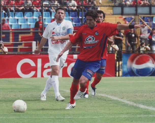 Paulo Centurión jugando para Municipal, disputando la final del Torneo Apertura 2008 frente a Comunicaciones. Atrás Rolando Fonseca de Comunicaciones.